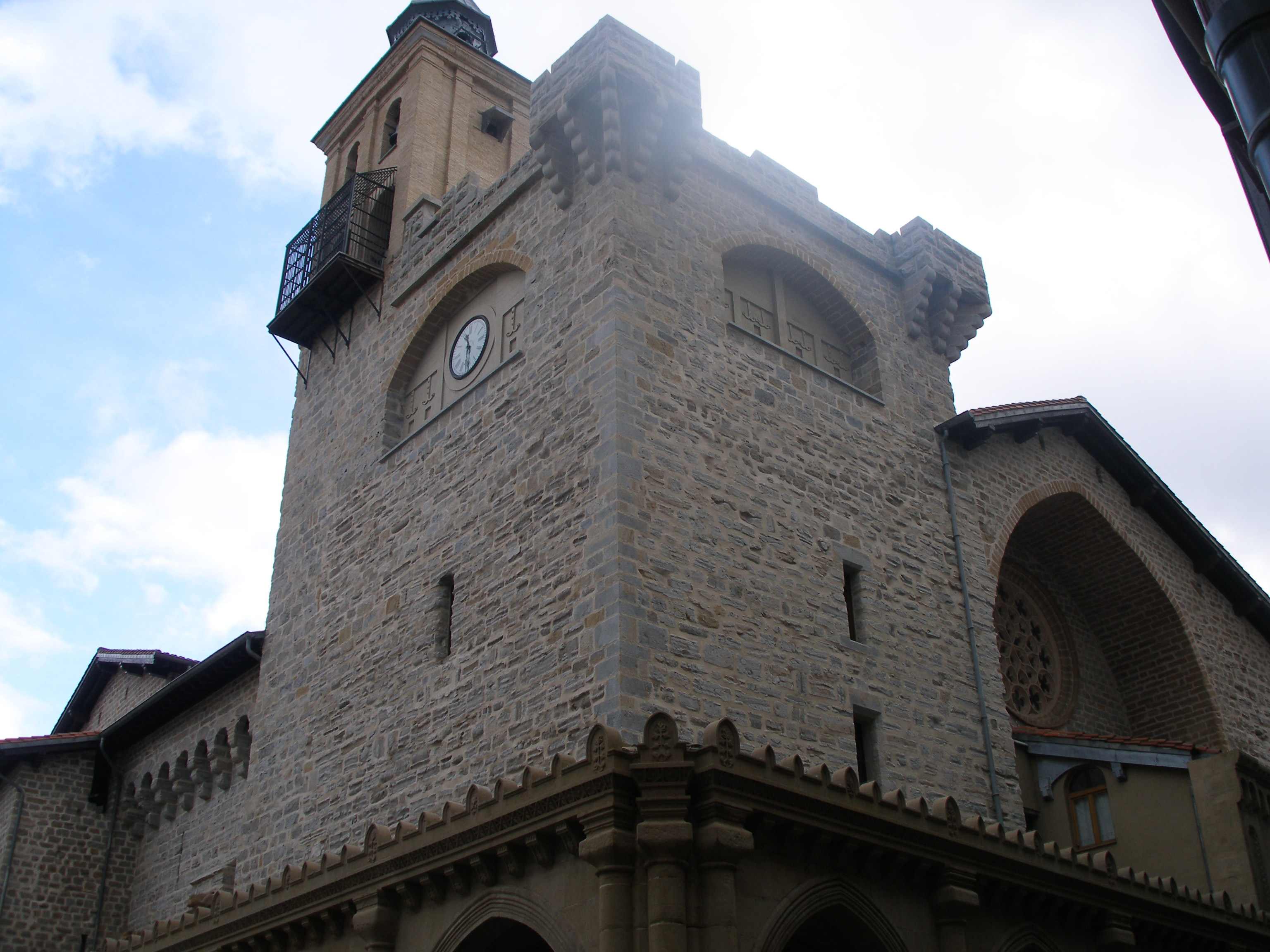 Iruñeko San Nicolas eliza.